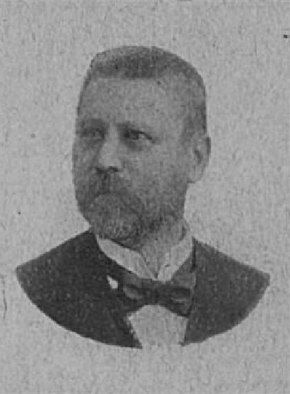 Petr František Krejčí (1843-1919), rakouský podnikatel a politik